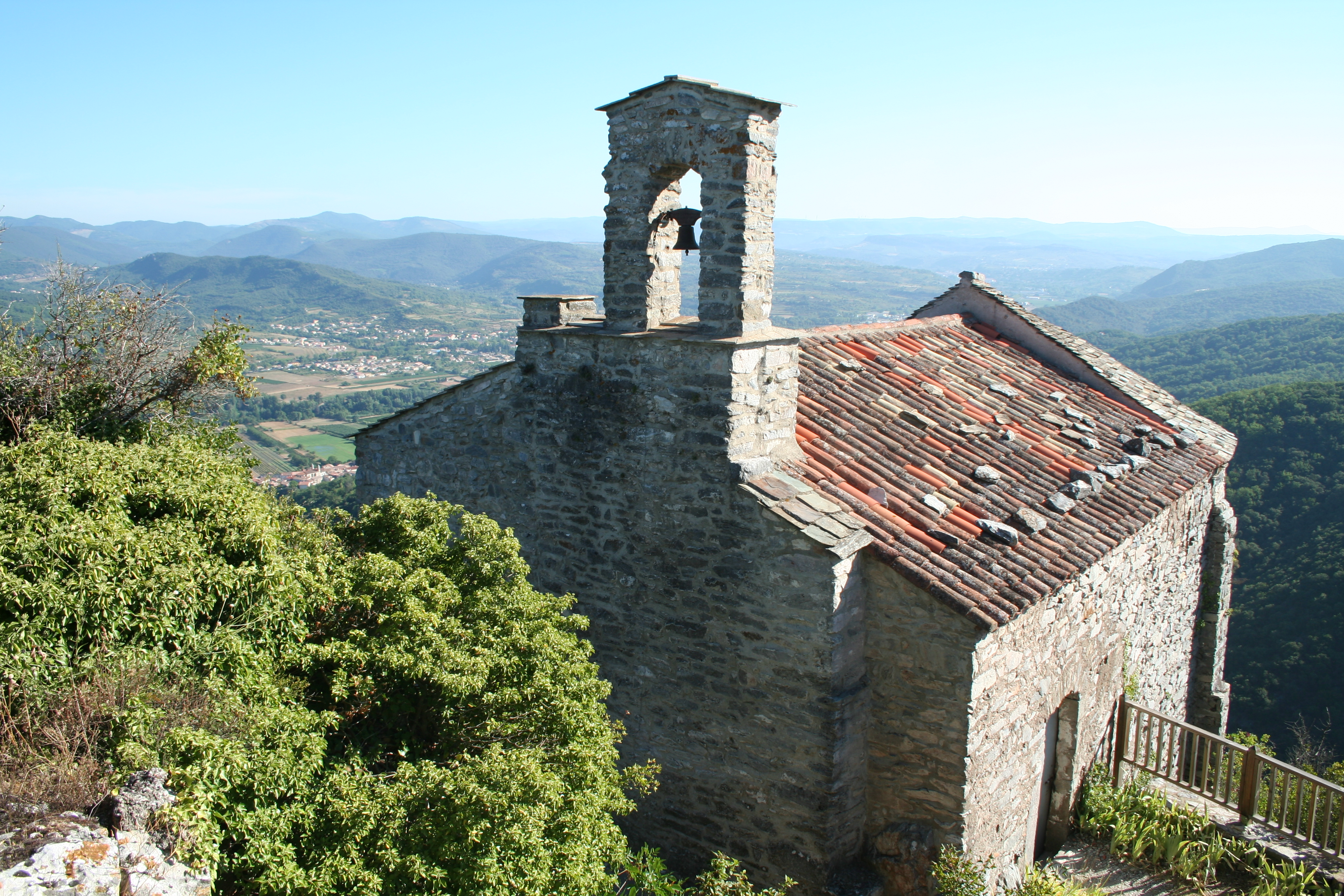 Les Aires (Hérault) - chapelle Saint-Michel du château de Mourcairol.